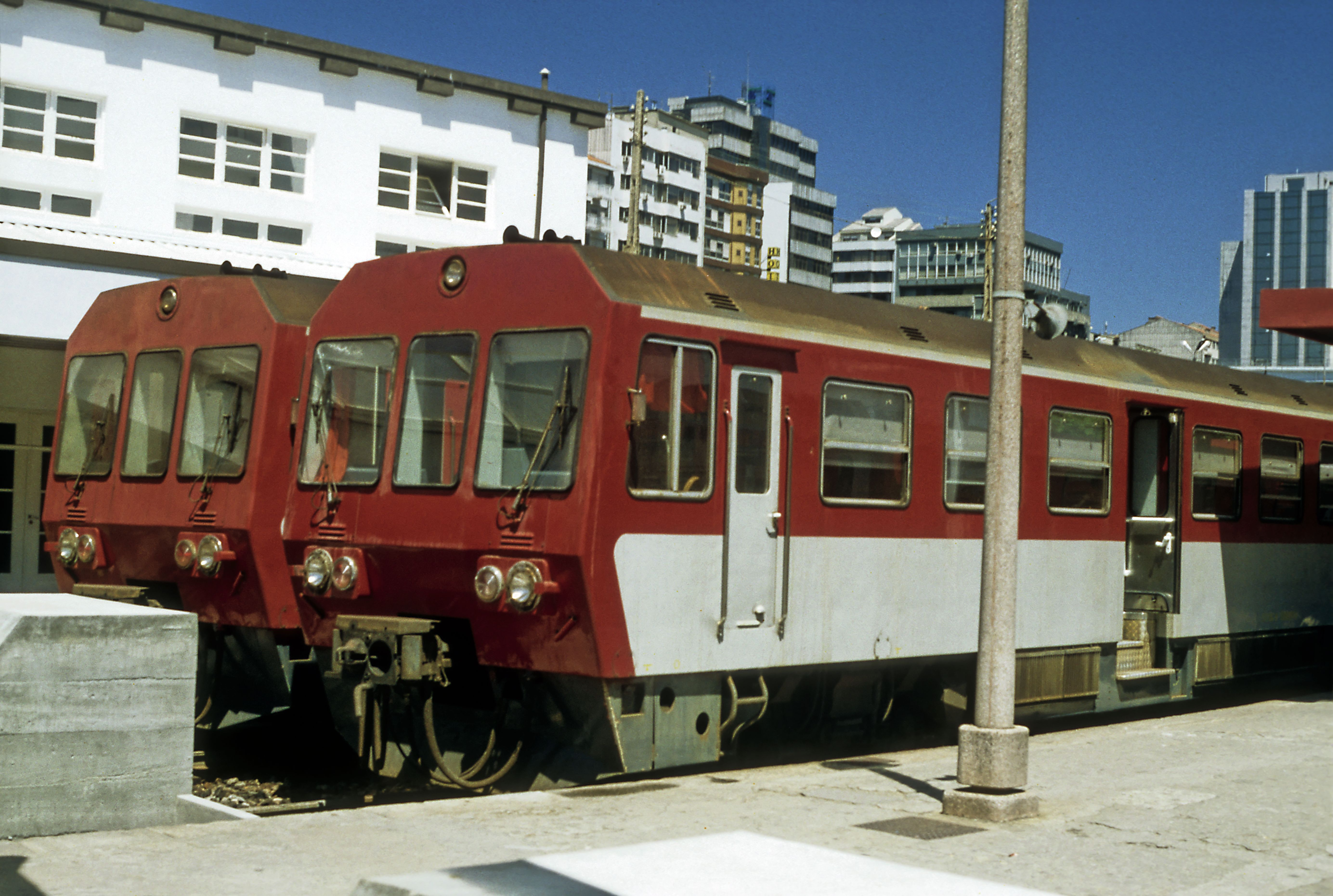 Bf Porto Trindade, Meterspurtriebzüge